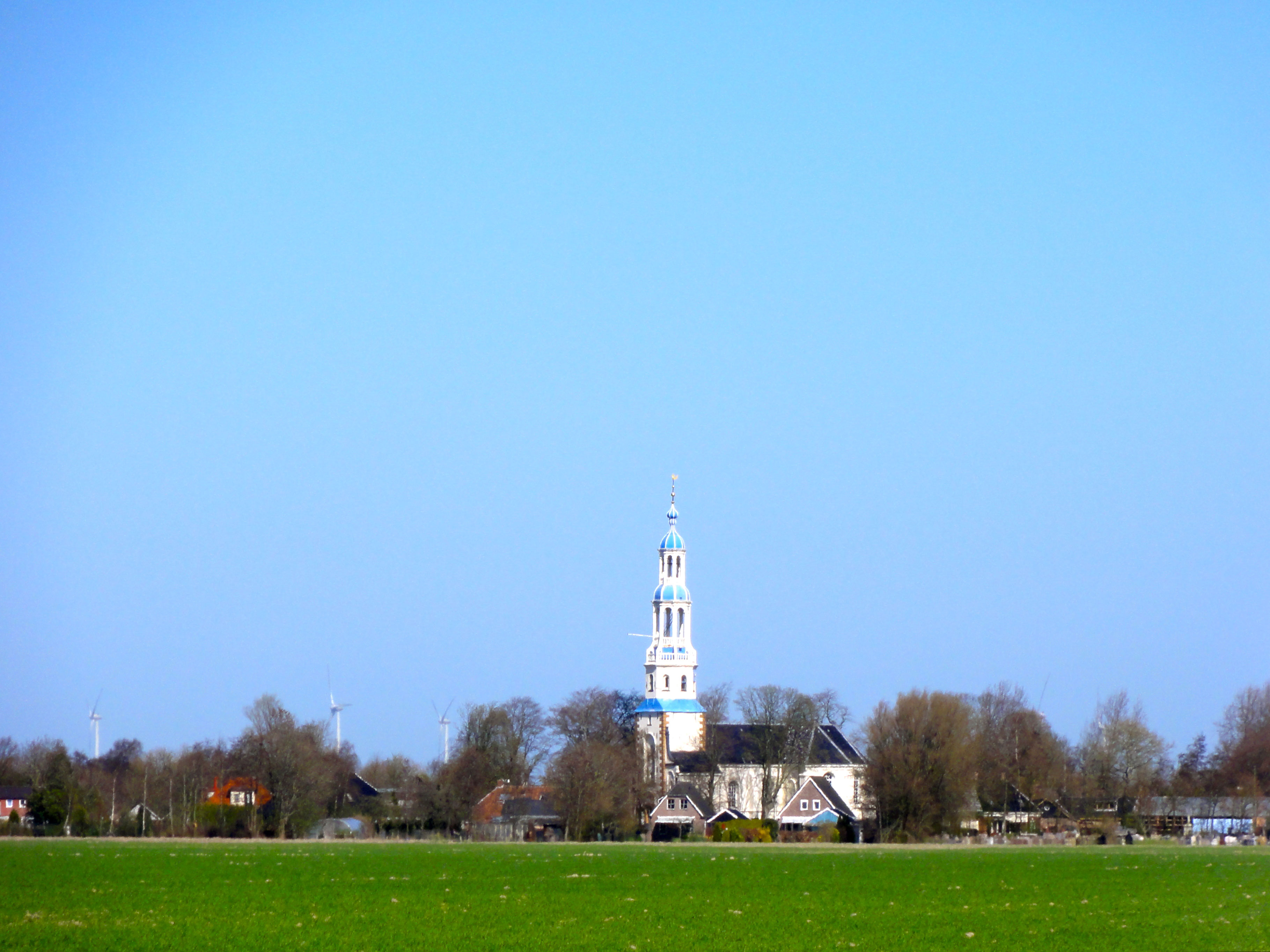 Zicht op Uithuizermeeden met de Mariakerk vanaf de Moeshornweg